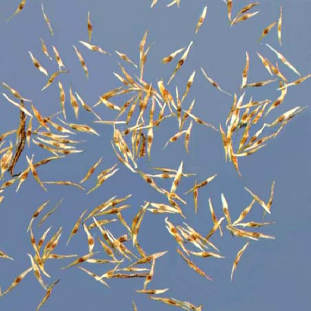 Buddleja davidii семе (аутор: Михаило Грбић)